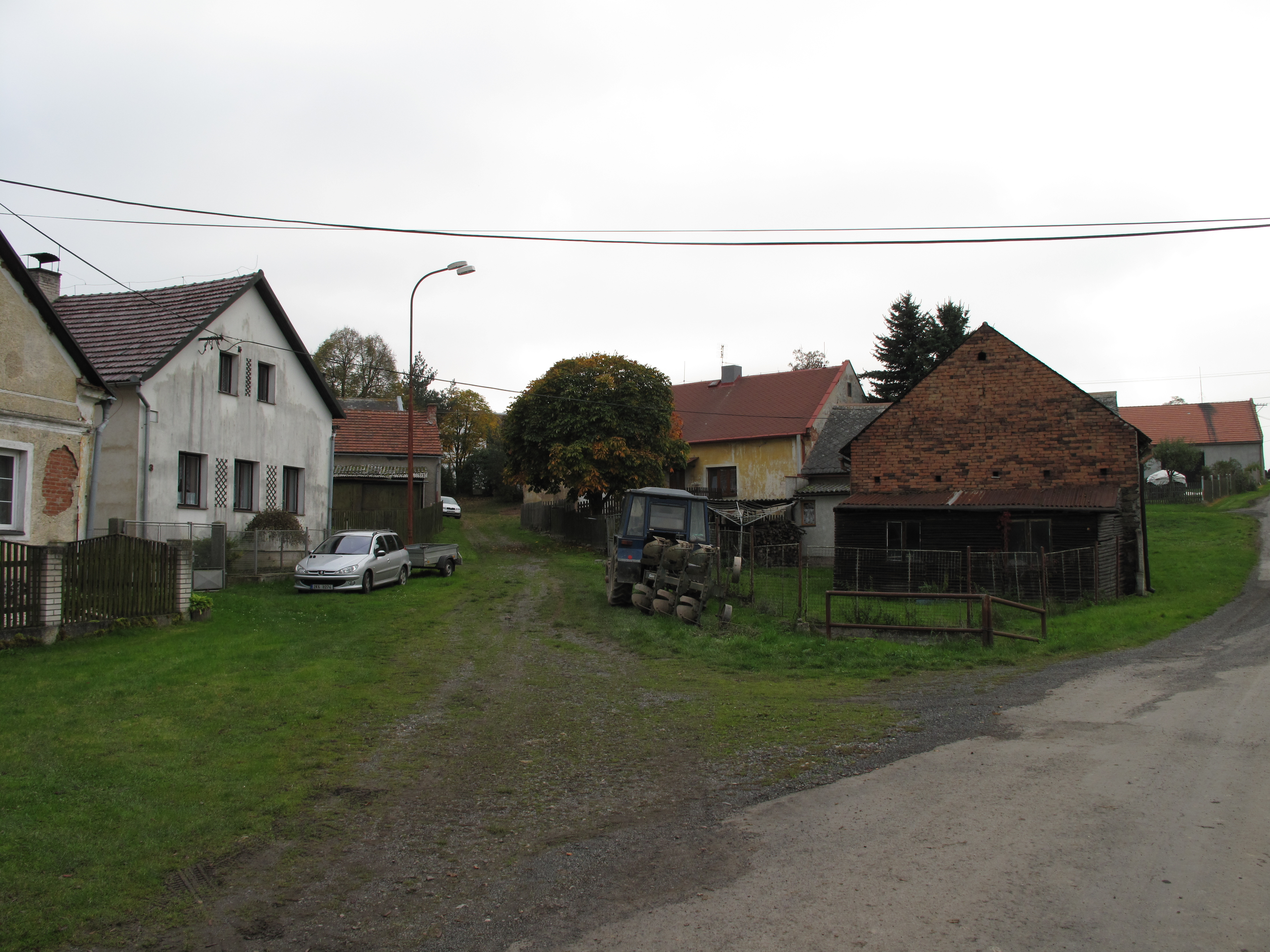 Cesta v Radotíně. Okres Karlovy Vary, Česká republika.